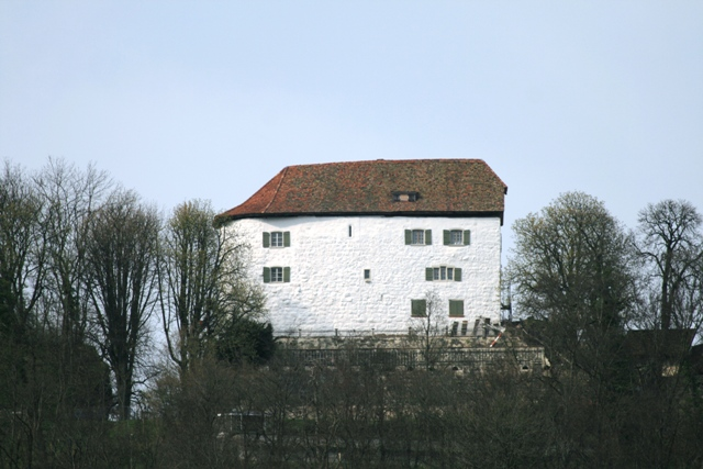 Schloss Brunegg, Aargau, Schweiz